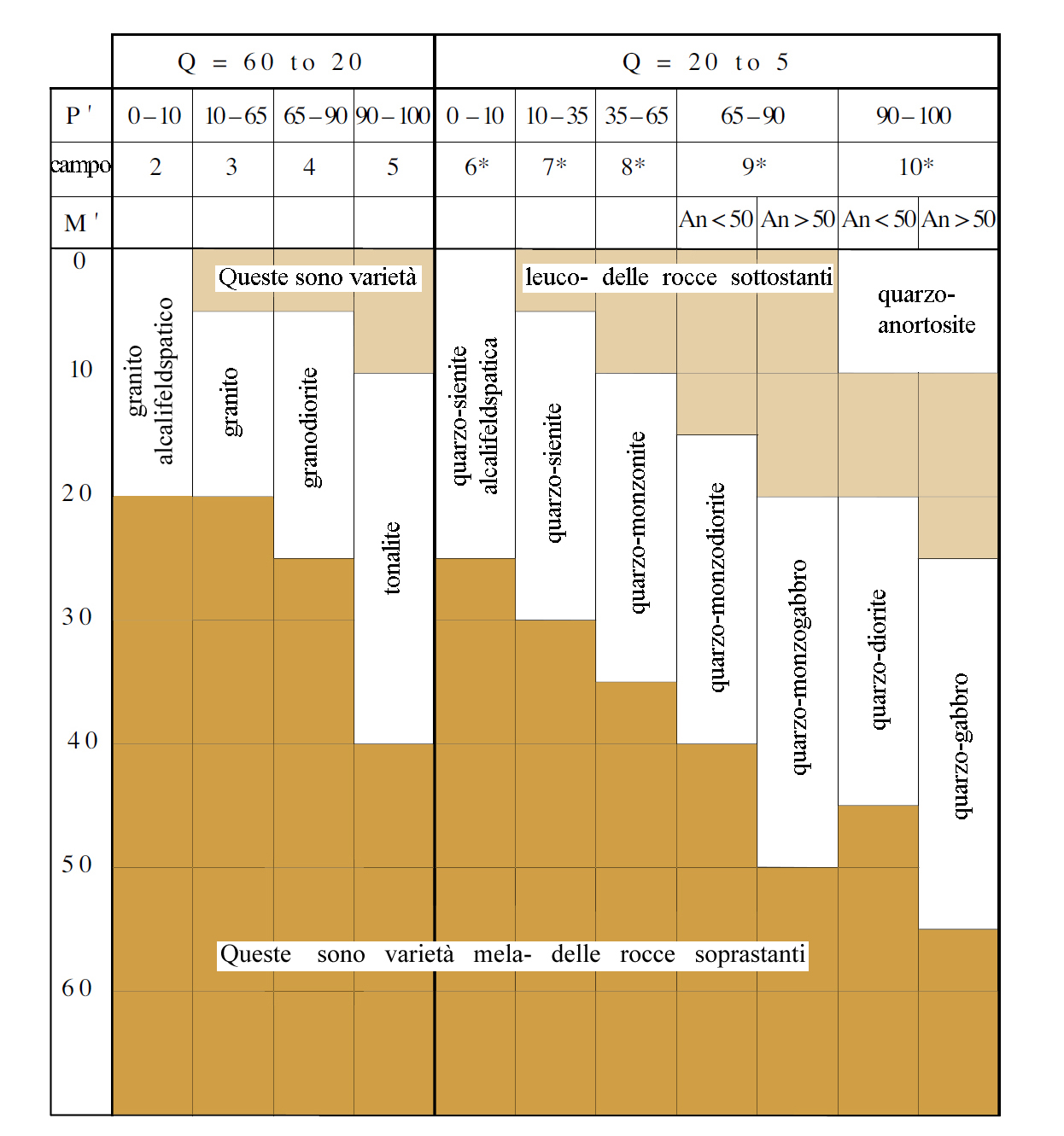 Nomenclatura delle rocce intrusive sovrassature in SiO2 in base all'indice di colore